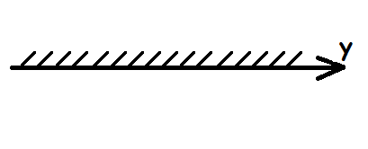 y ir jebkurš skaitlis